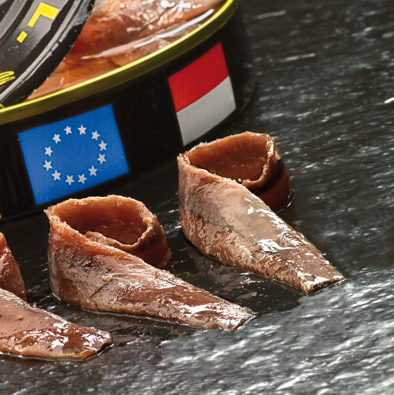 Las tradicionales anchoas de Santoña, las mejores del mundo